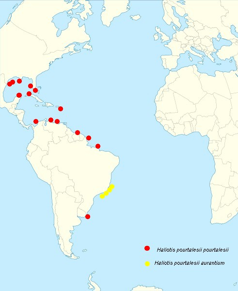 Distribution of Haliotis pourtalesii species in Atlantic Ocean. Red points Haliotis pourtalesii pourtalesii; yellow poins Haliotis pourtalesii aurantium